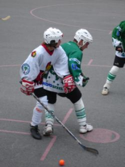 Fotka 2 hokejbalistů při vzájemném souboji